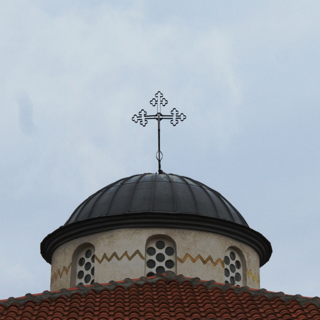 Црква_Светог_Николе_у_Приштини